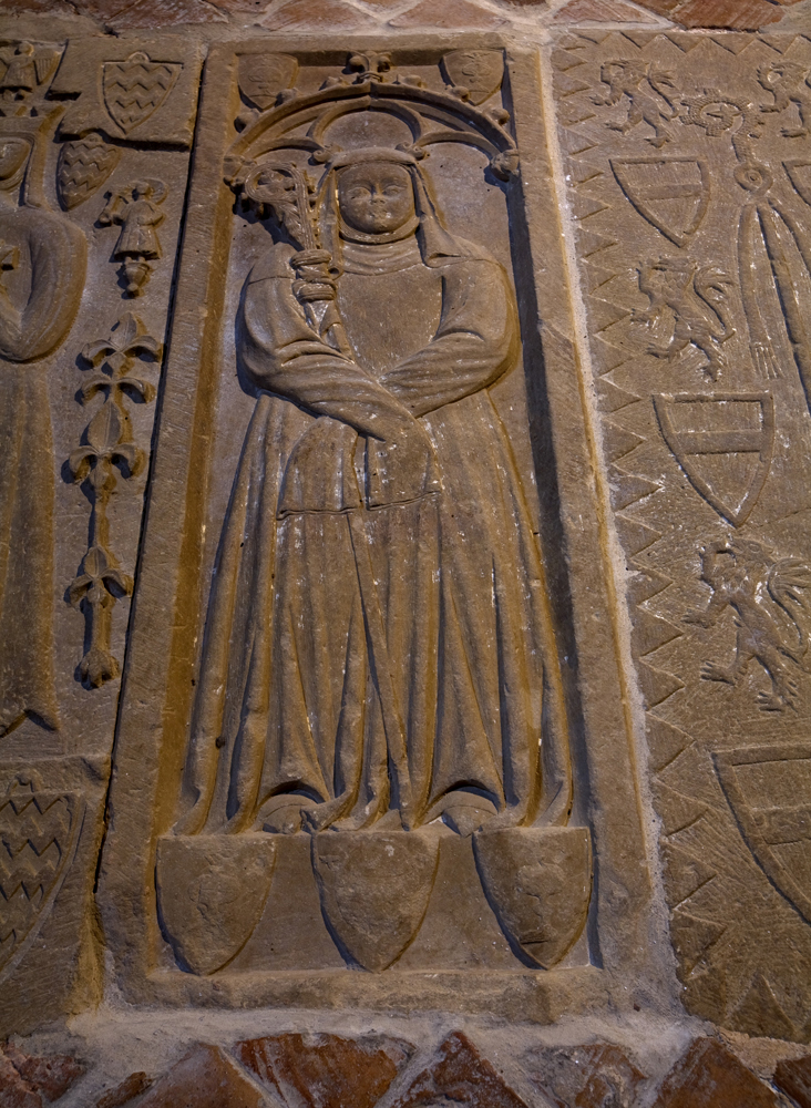 Làpida sepulcral d'Elisenda de Copons.